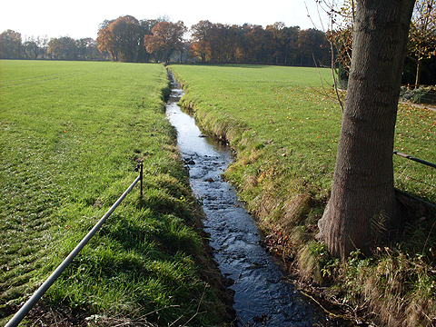 Der Menkebach bei Sende, Blick flussabwärts